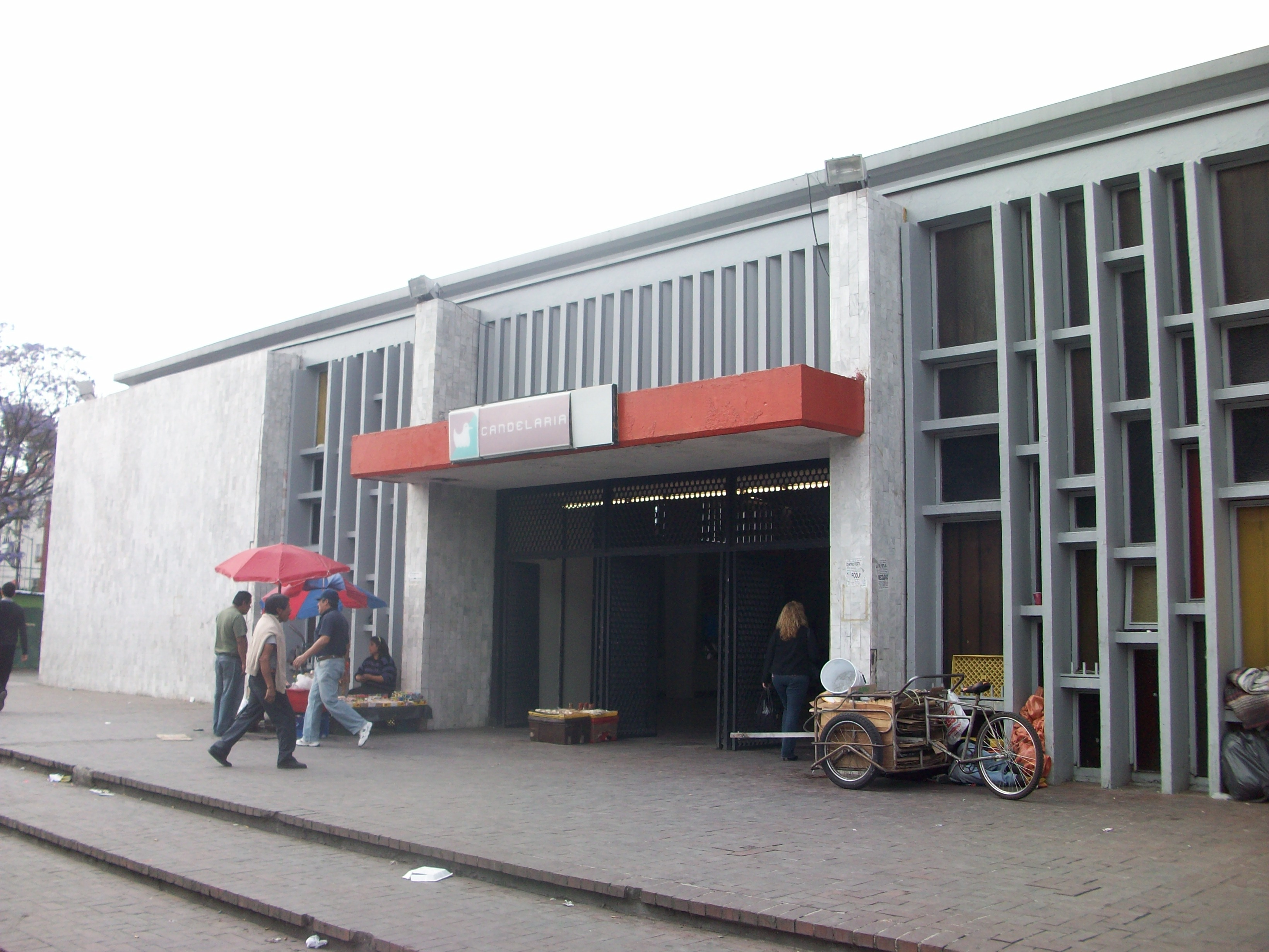 Entrada a la estación Candelaria de la linea 1